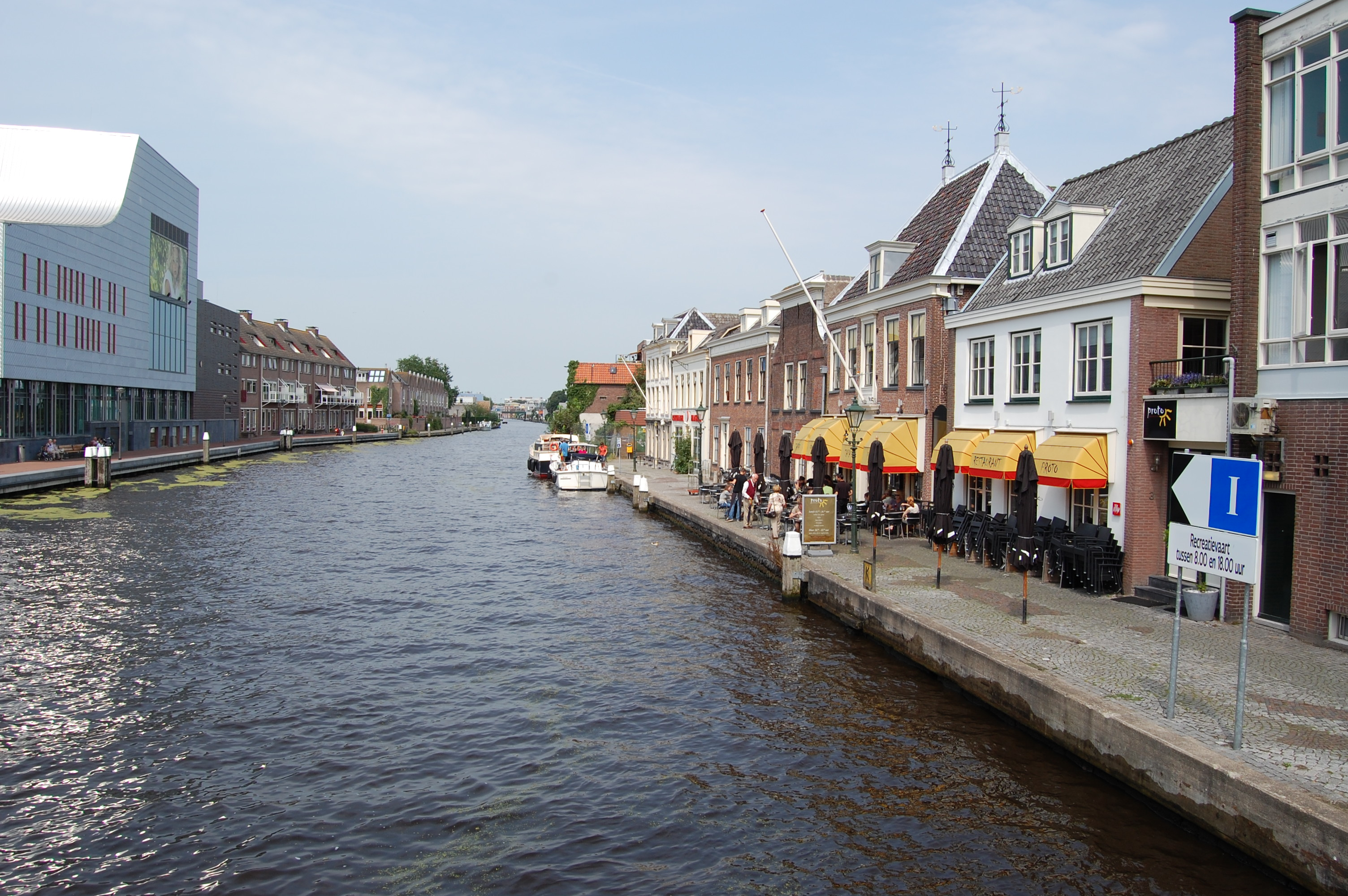 De kortdurende mogelijkheid voor aanleg van jachten in het centrum van Alphen aan den Rijn.